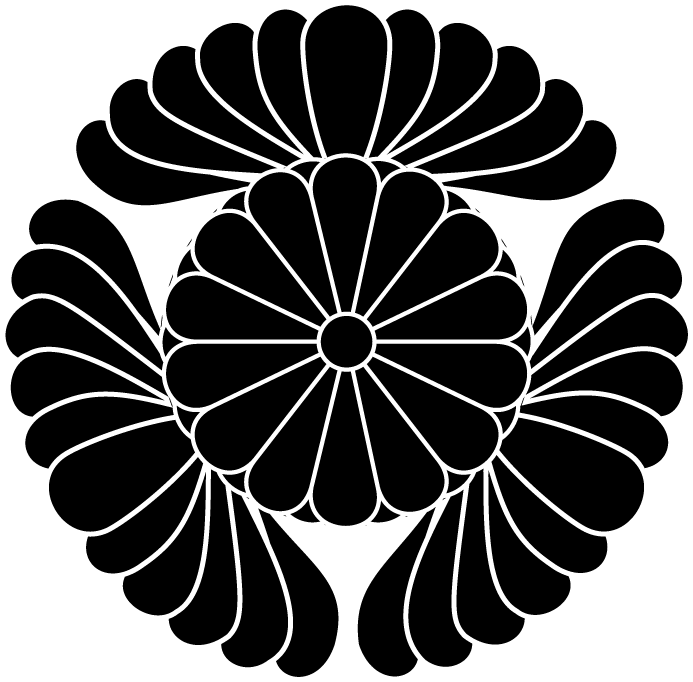 高松宮家紋